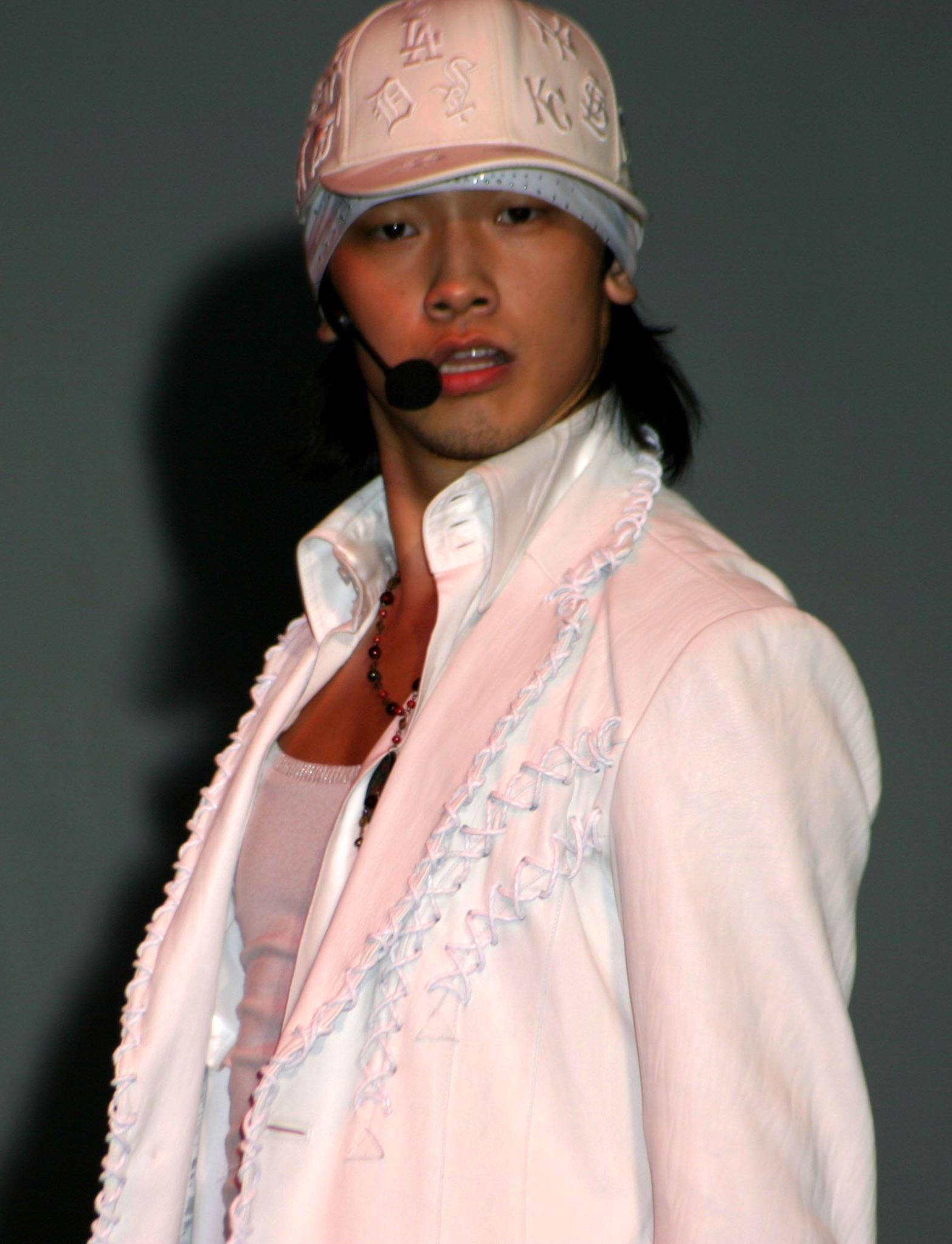 Rain (singer)